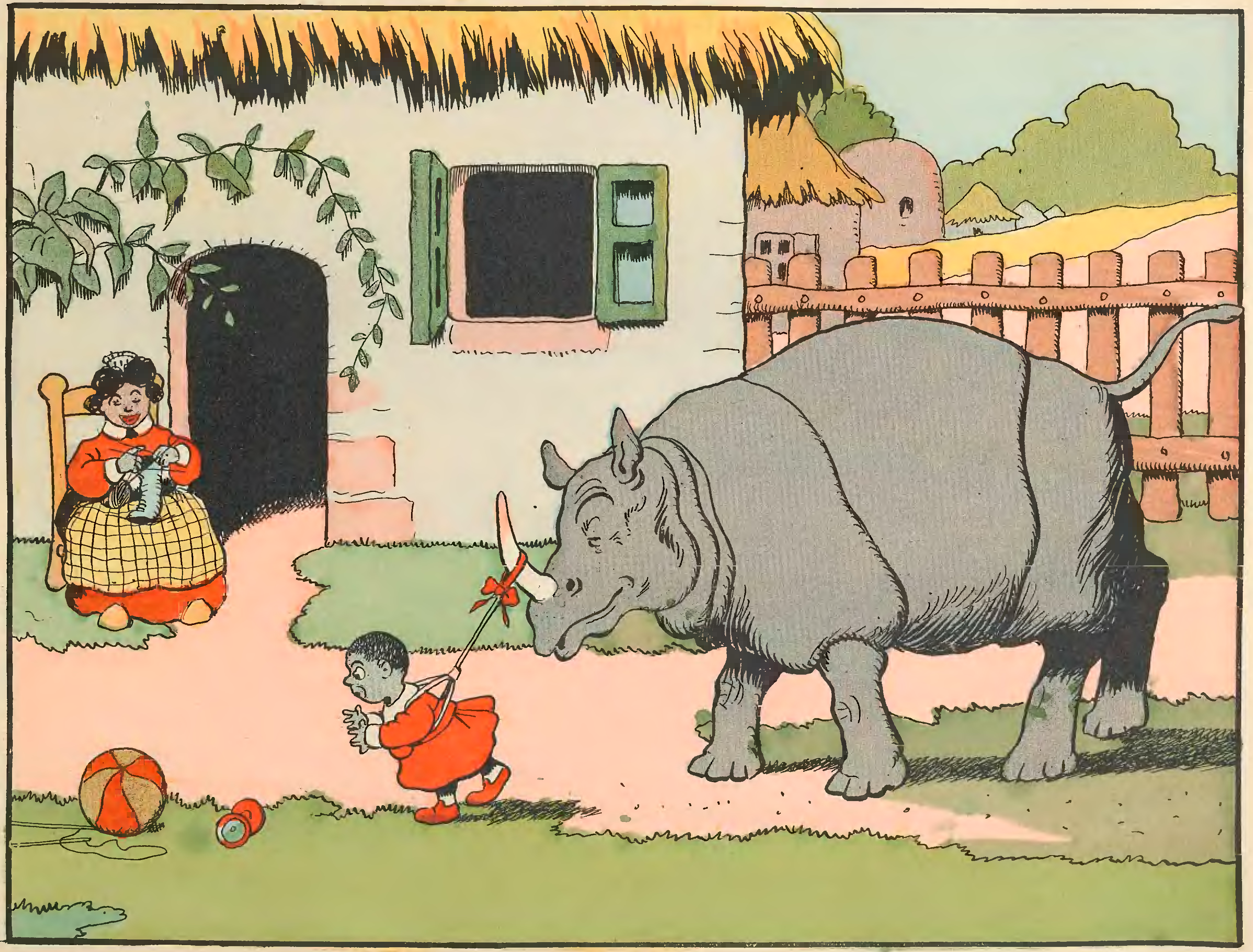 image page 43 du djvu